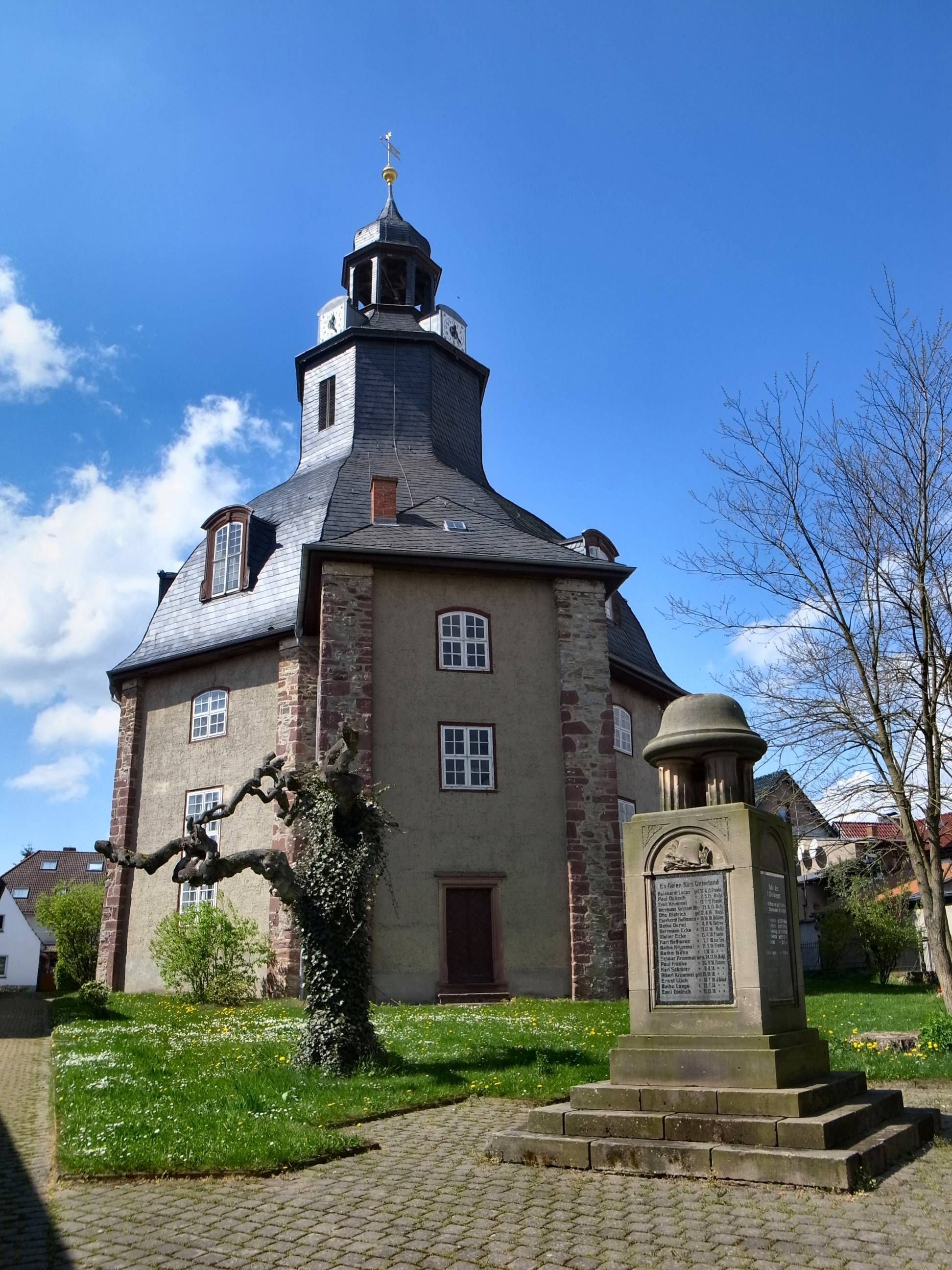 Schwenda, Evangelische Kirche St. Cyriaci und Nicolai, Gefallenendenkmal I. und II Weltkrieg